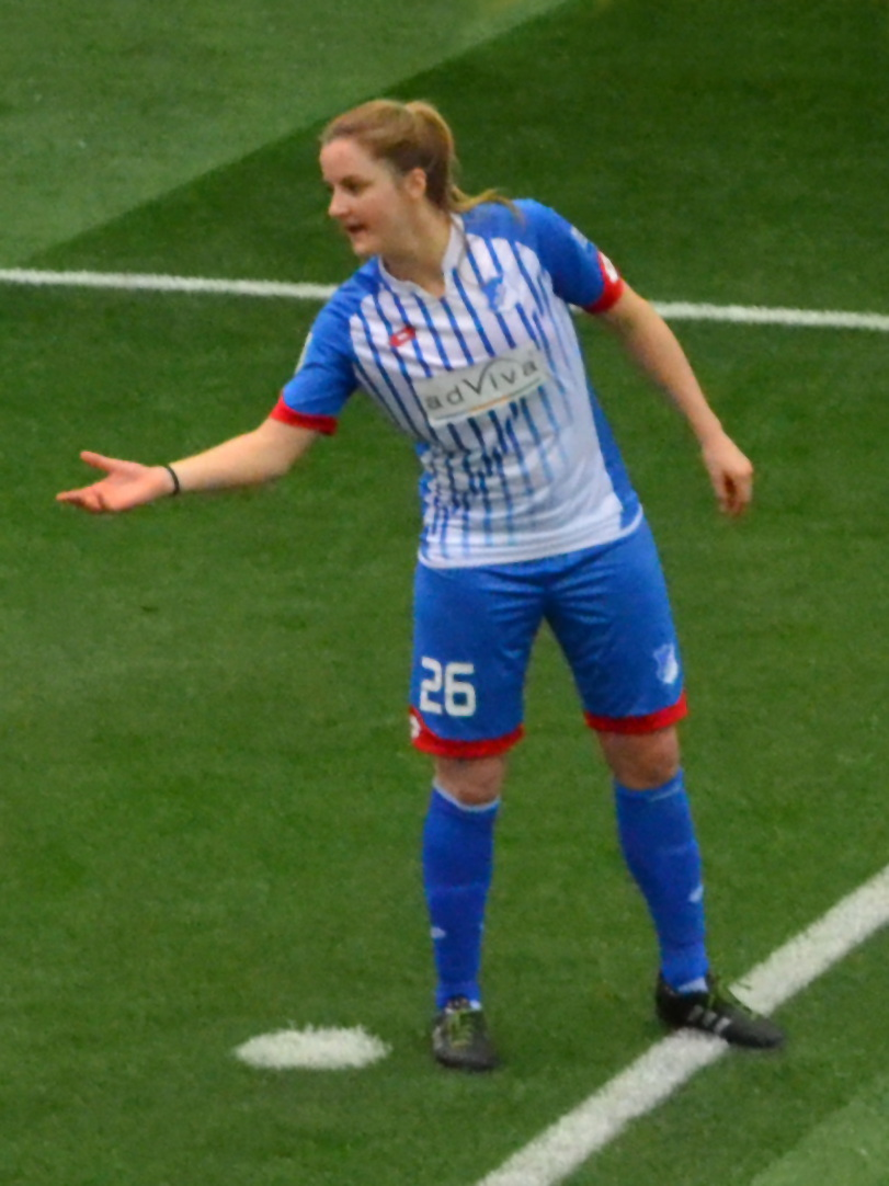 Sophie Howard (TSG 1899 Hoffenheim) beim SAP Frauen-FußballCup 2016